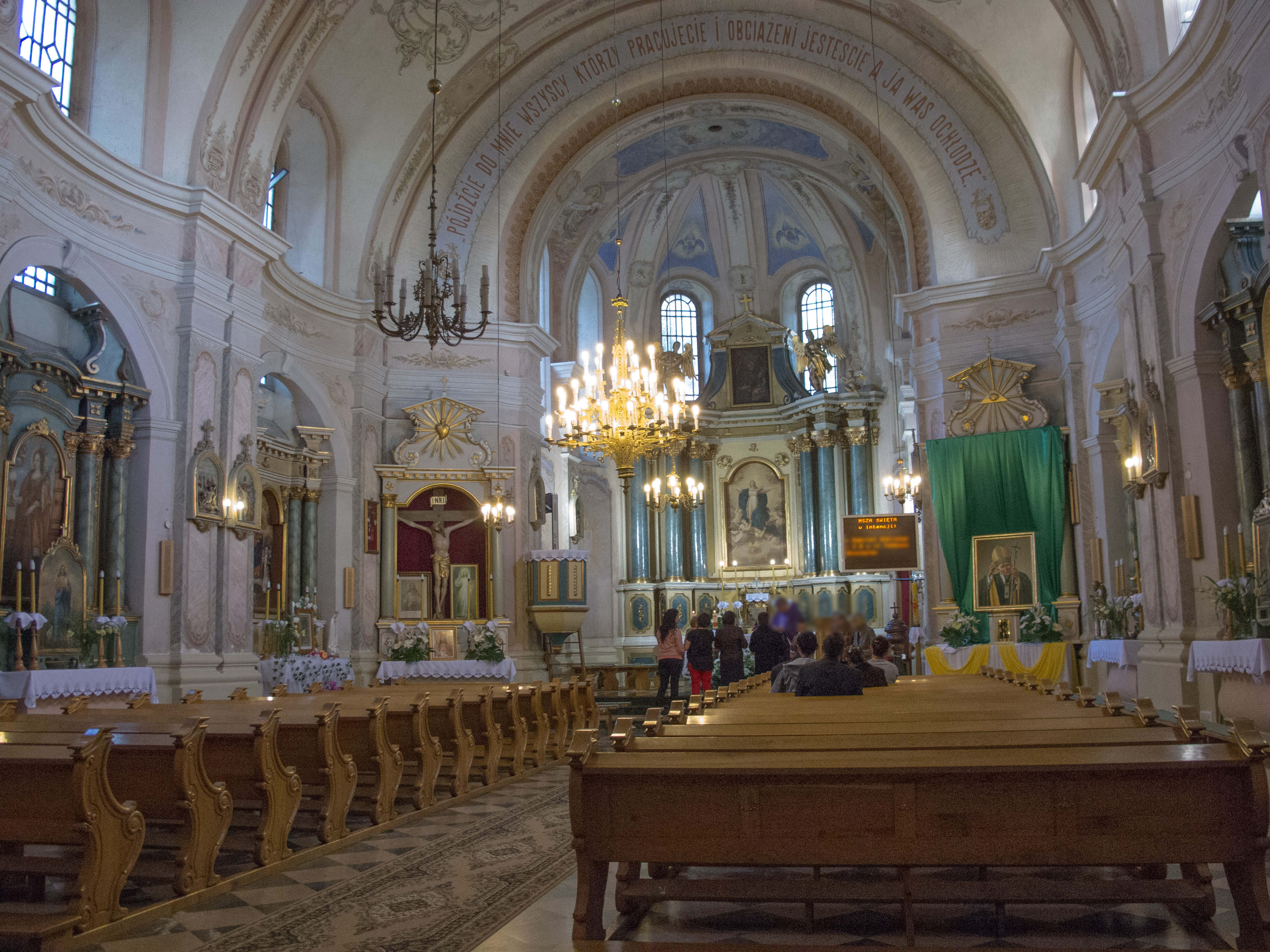 Puchaczów - zespół kościoła par. p.w. Wniebowzięcia NMP, 1778-1800